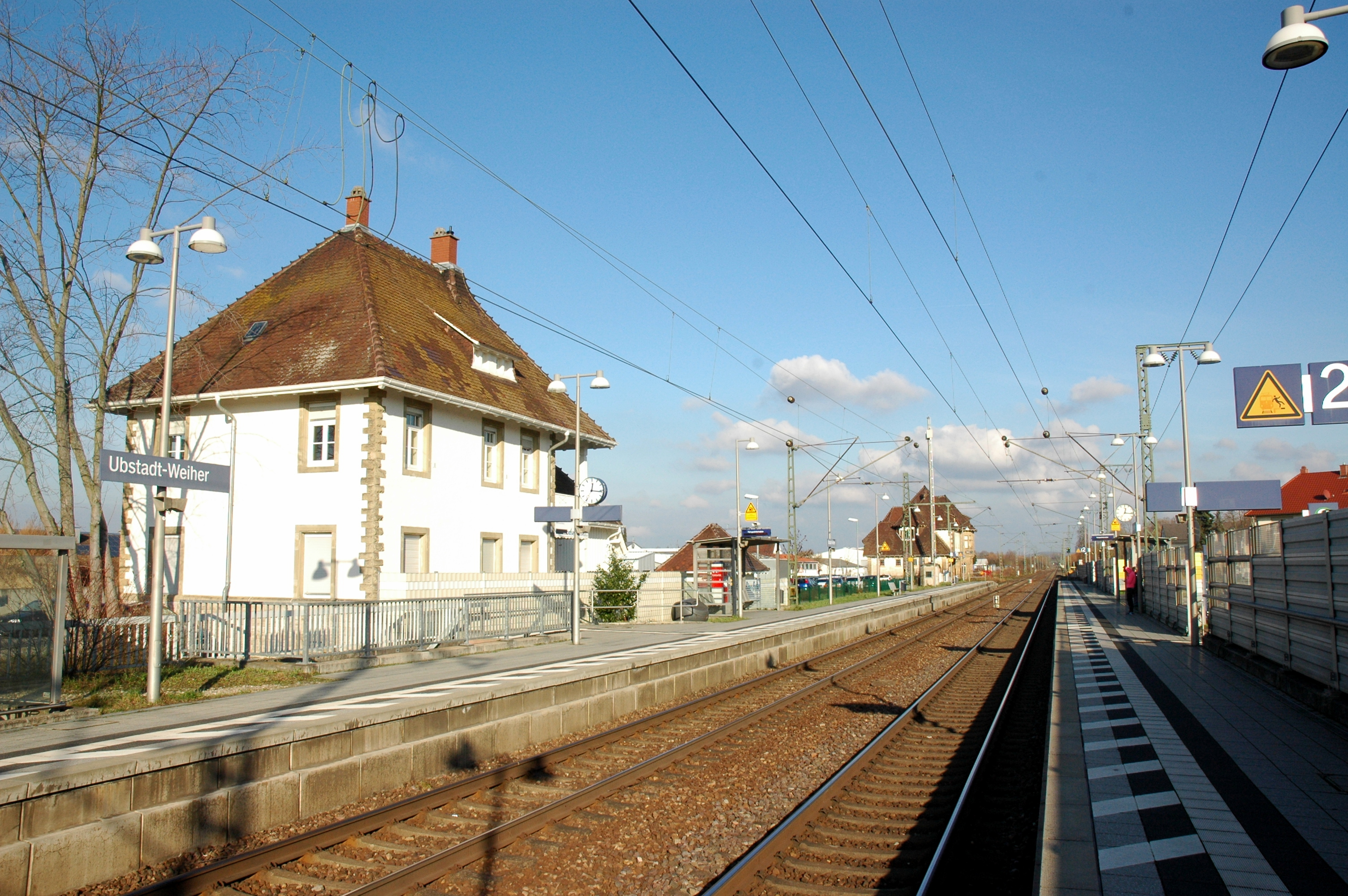 Ubstadt-Weiher